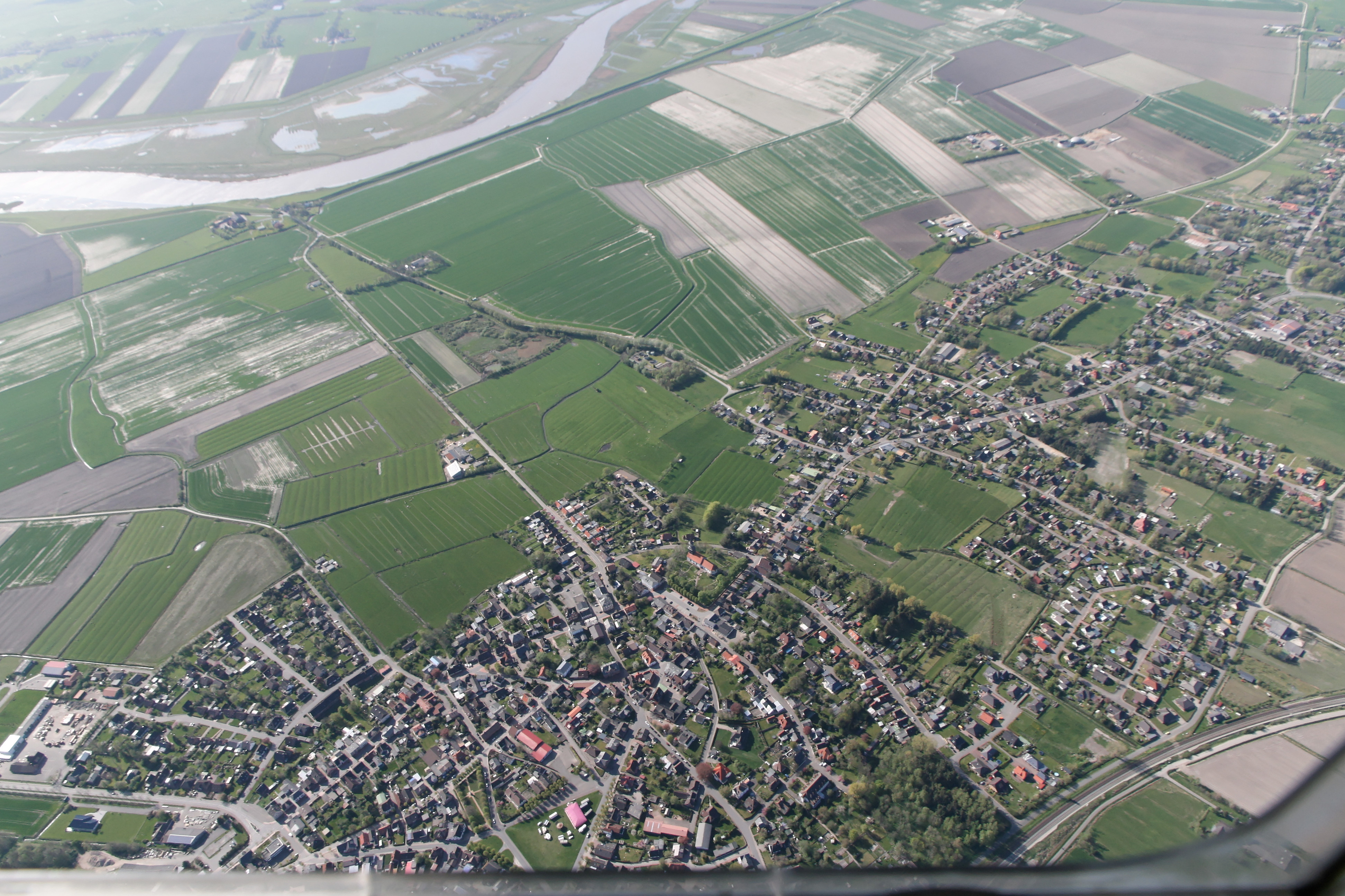 der Ort Lunden (vorn) und der Ort Lehe (rechts), im Hintergrund die Eider